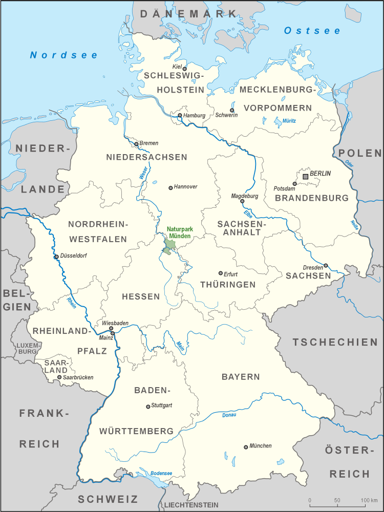 Karte des Naturparks Münden in Deutschland